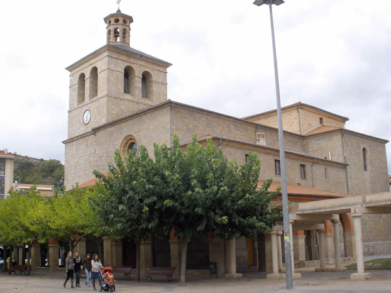 Iglesia de San Juan Evangelista (Huarte-Uharte, Navarra)